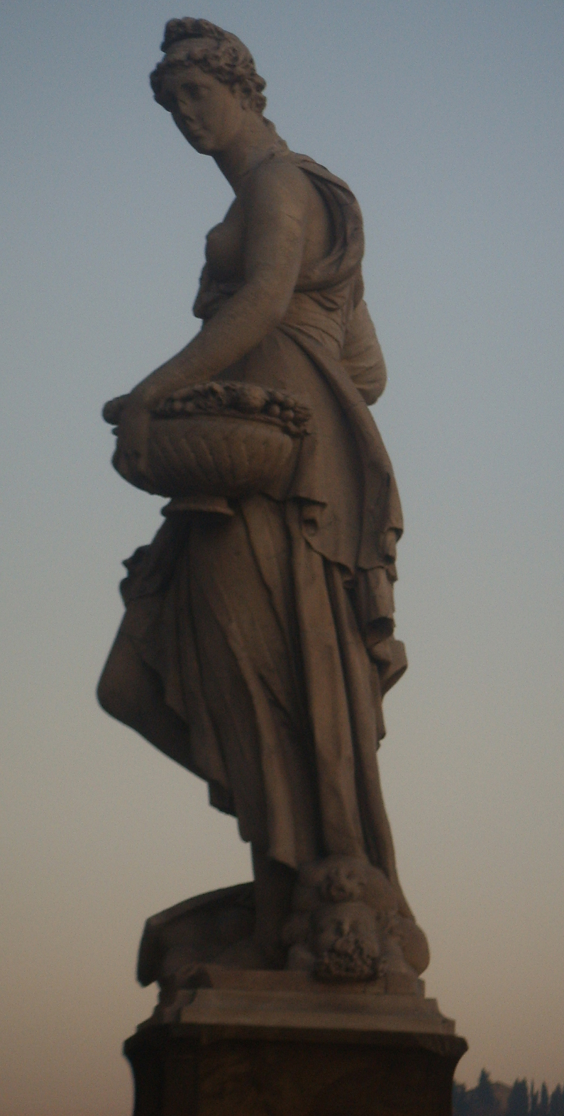 Pietro Francavilla, La Primavera. Statua all'imbocco di Ponte Santa Trìnita a Firenze.